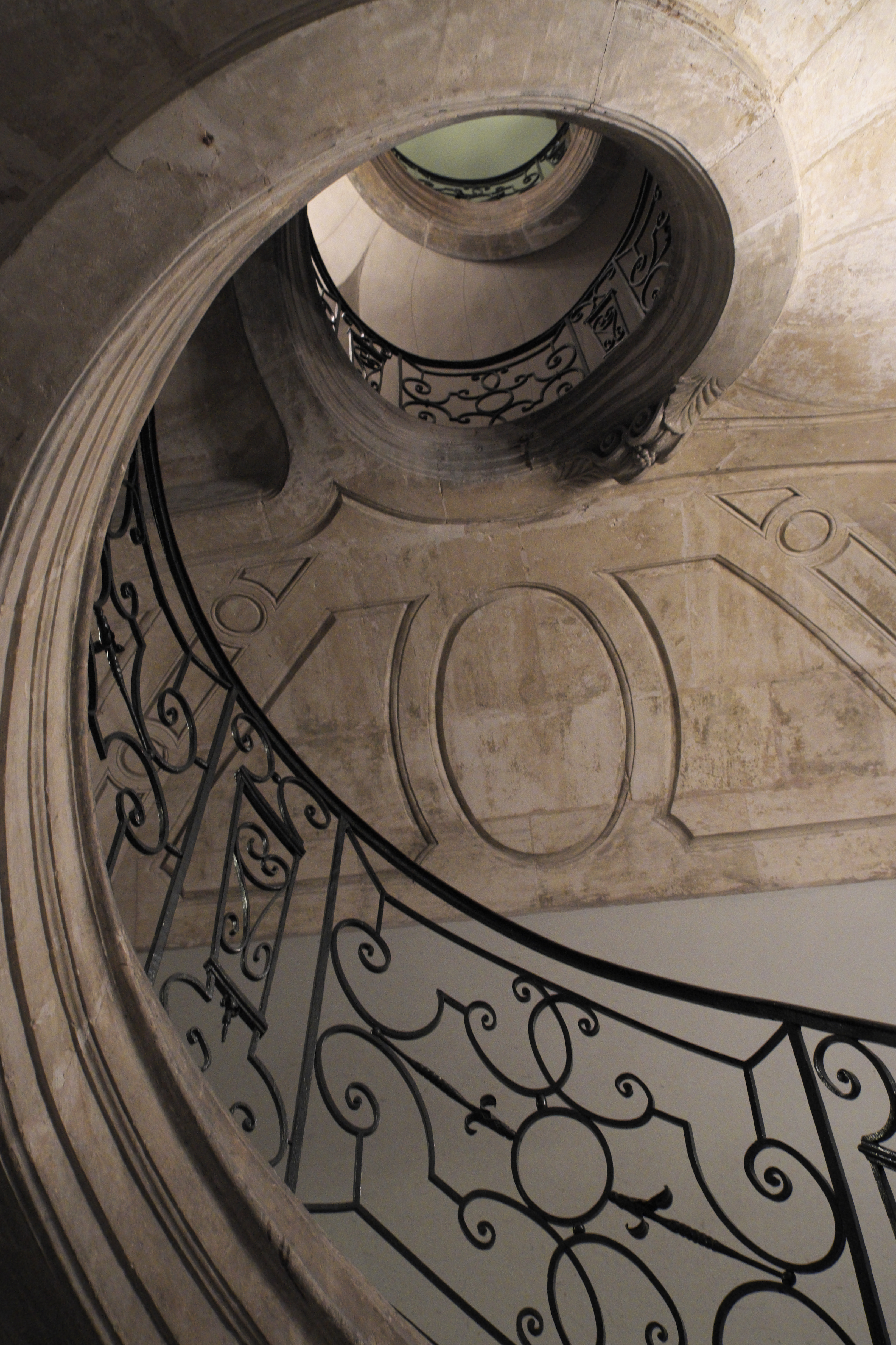 Ehemalige Prämonstratenserabtei in Pont-à-Mousson im Département Meurthe-et-Moselle (Region Grand Est/Frankreich), rundes Treppenhaus